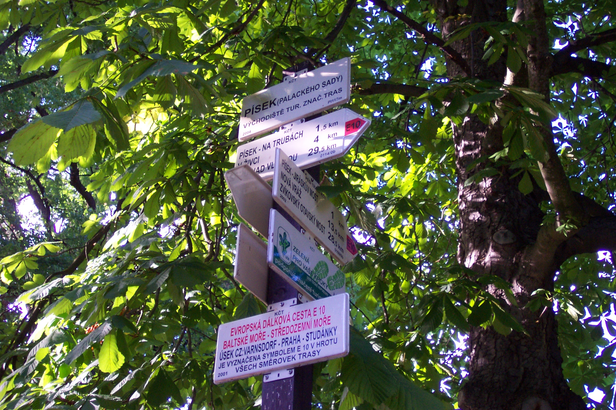 Turistický označník v píseckých Palackého sadech - Turistic signs in Písek's Palackého sady park.